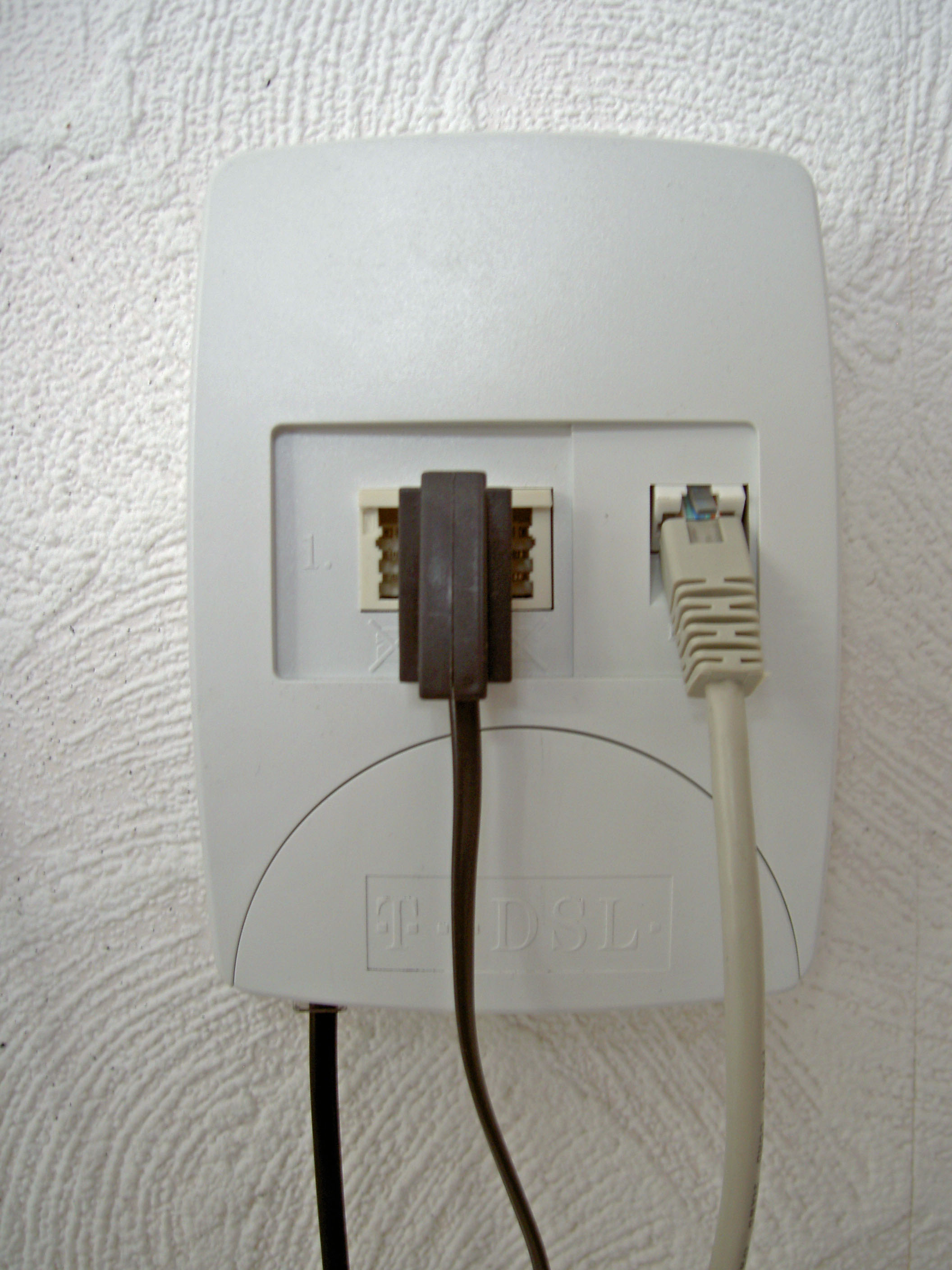 Splitter ADSL T-DSL ISDN